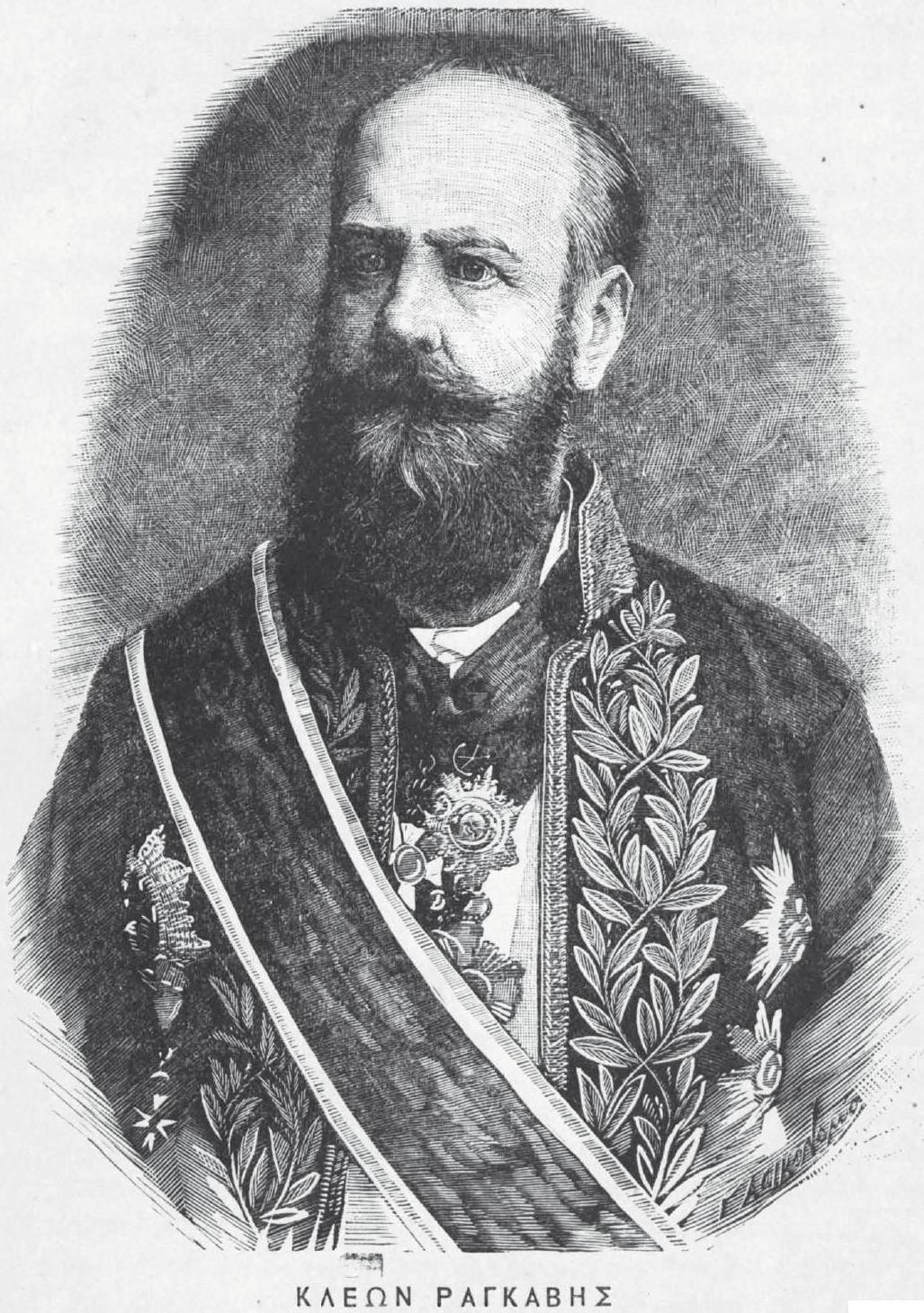 namhafte Griechische Persönlichkeit, 19. Jahrhundert